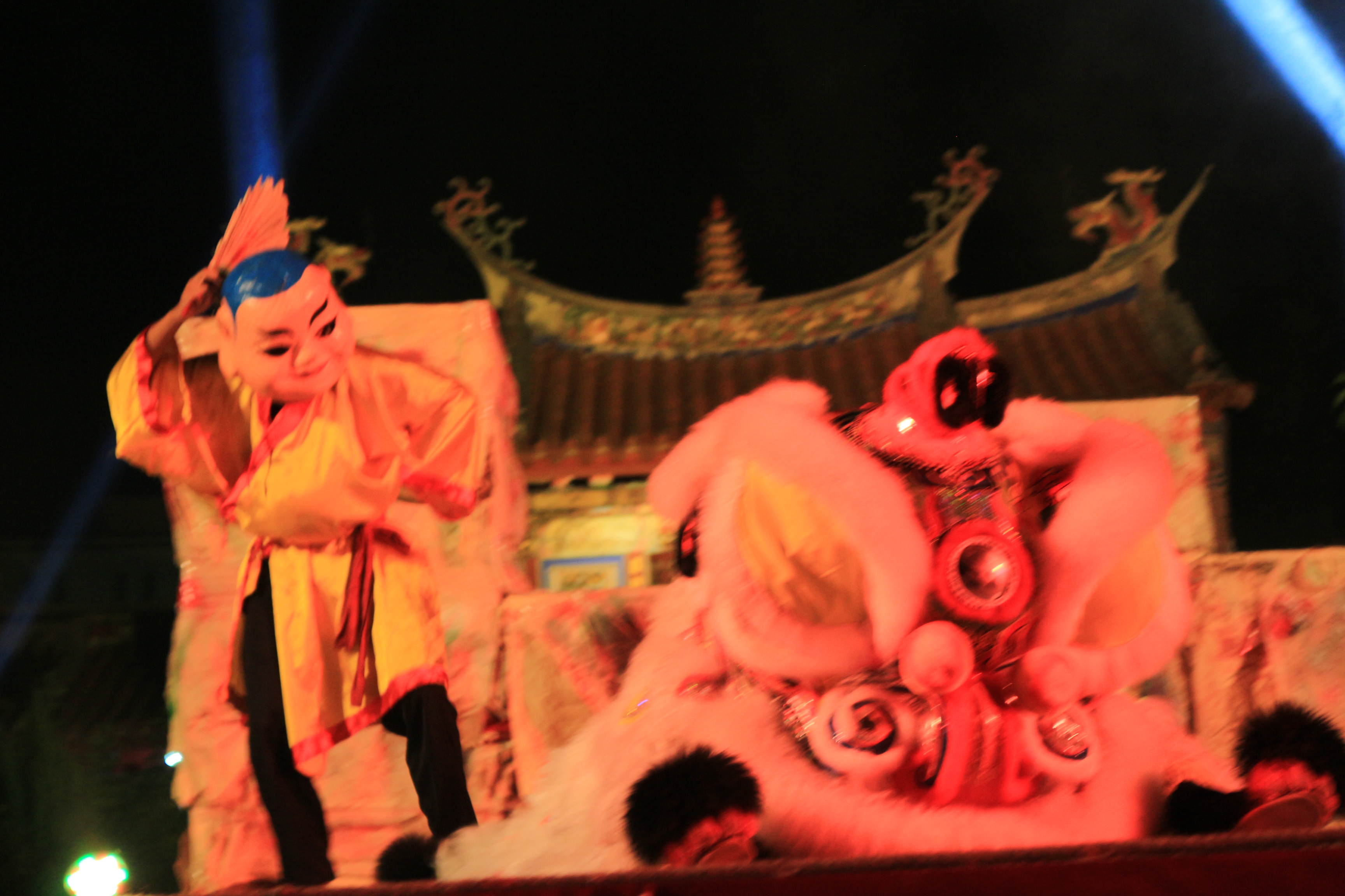 沉睡中的獅子，經由引獅郎（大頭佛）的挑動，伸伸懶腰、舔洗身軀一番，細膩的展現獅子的各種樣貌，喜、怒、哀、樂、動、靜、驚、疑，表現出人與獅之間的親密情感。